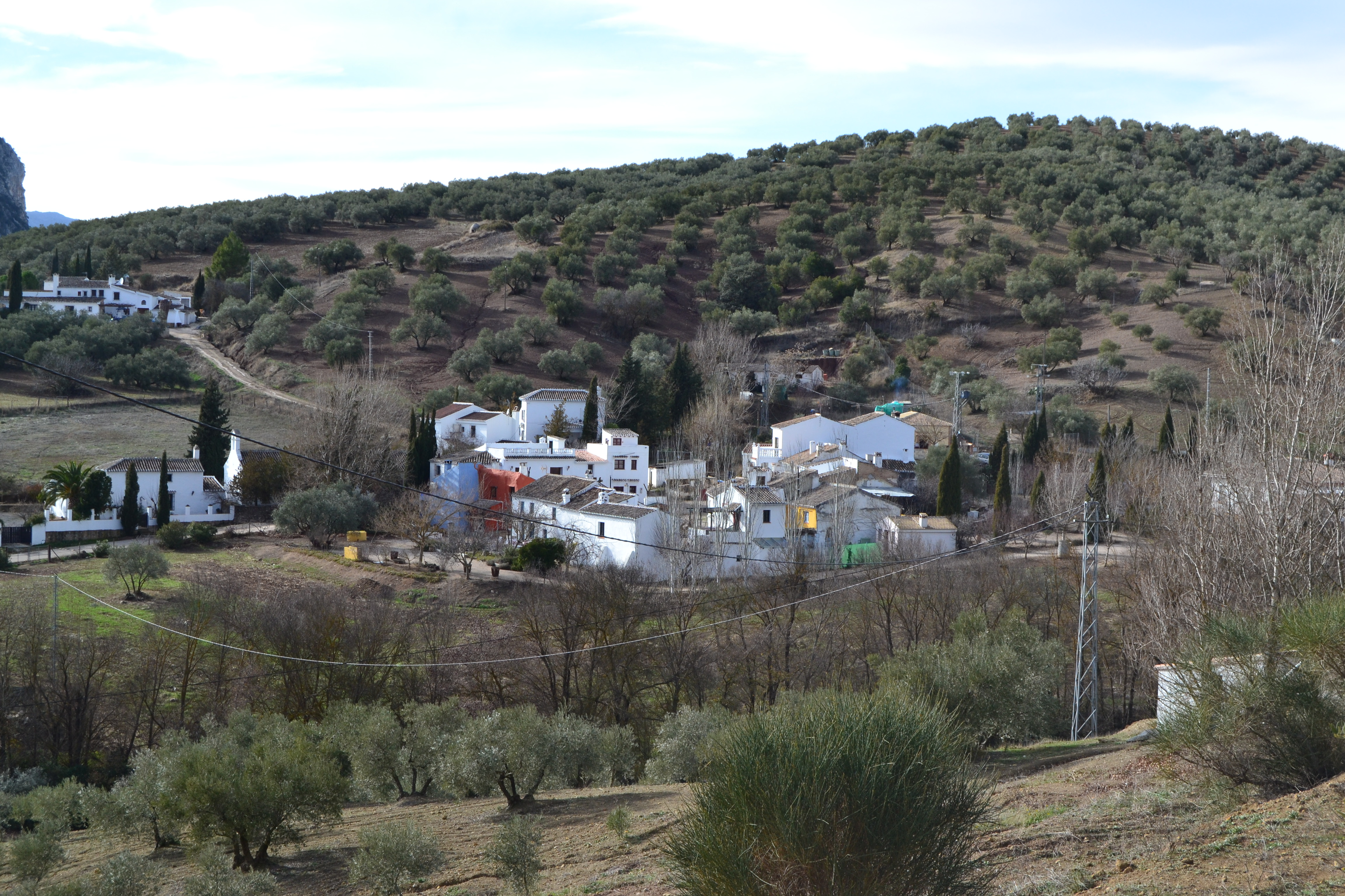 Aldea de Villanueva del Rosario